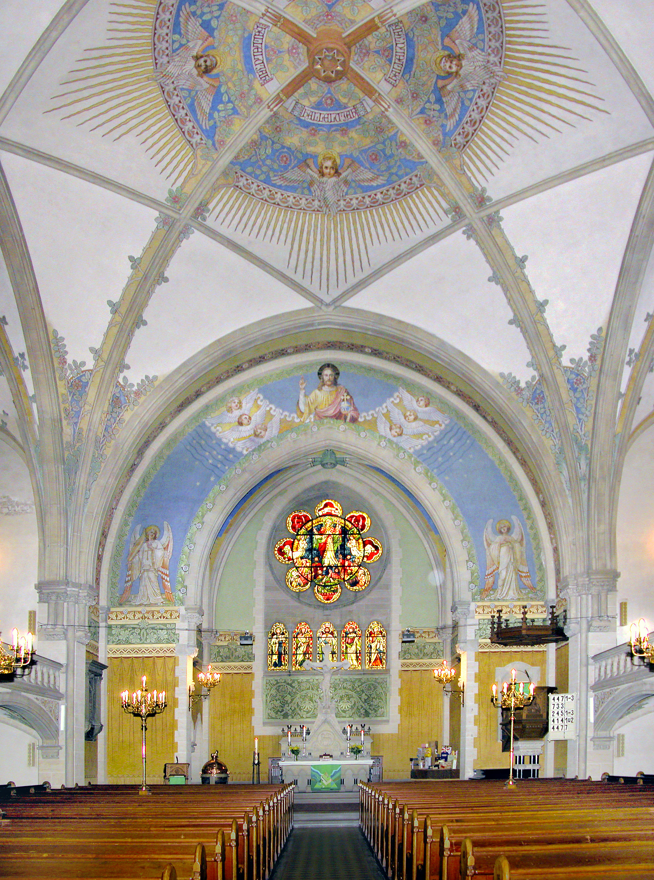 12.07.2009 01257 Dresden-Leuben, Altleuben 13: Die Himmelfahrtskirche (GMP 51.010984,13.825880) wurde 1901 nach Entwürfen von Karl Emil Scherz erbaut. Die Ausmalung mit Jugendstilanklängen stammt von Hofmaler Julius Schultz. [DSCN38182-38183TIF]20090712060MDRMDR.JPG(c)Blobelt